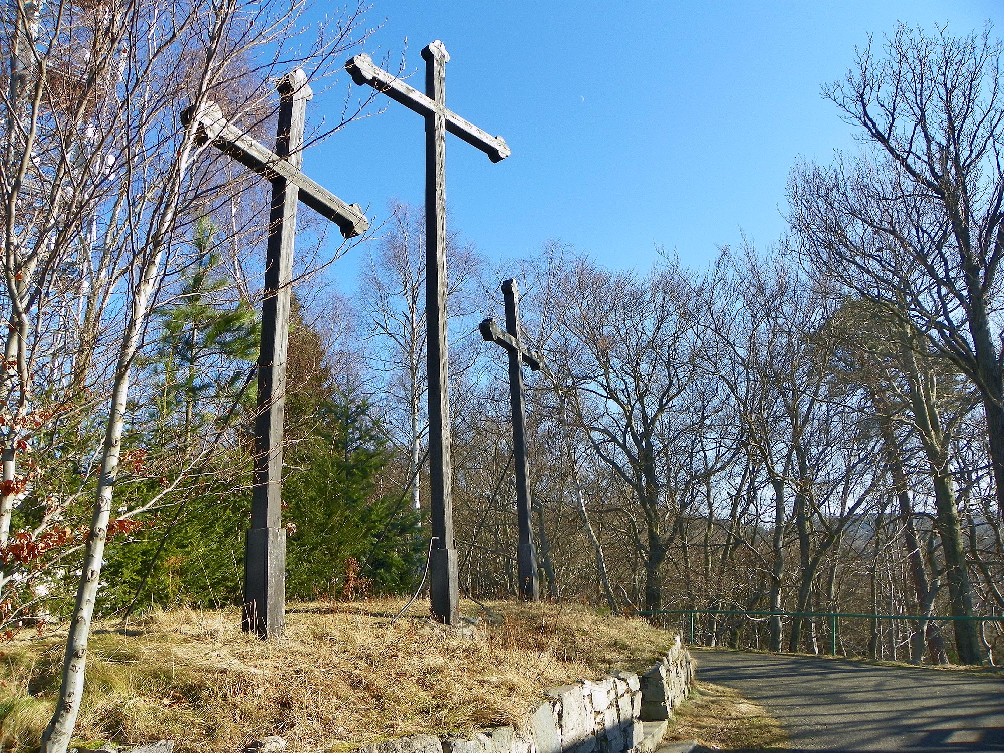 Tři dřevěné kříže - vyhlídka - Karlovy Vary